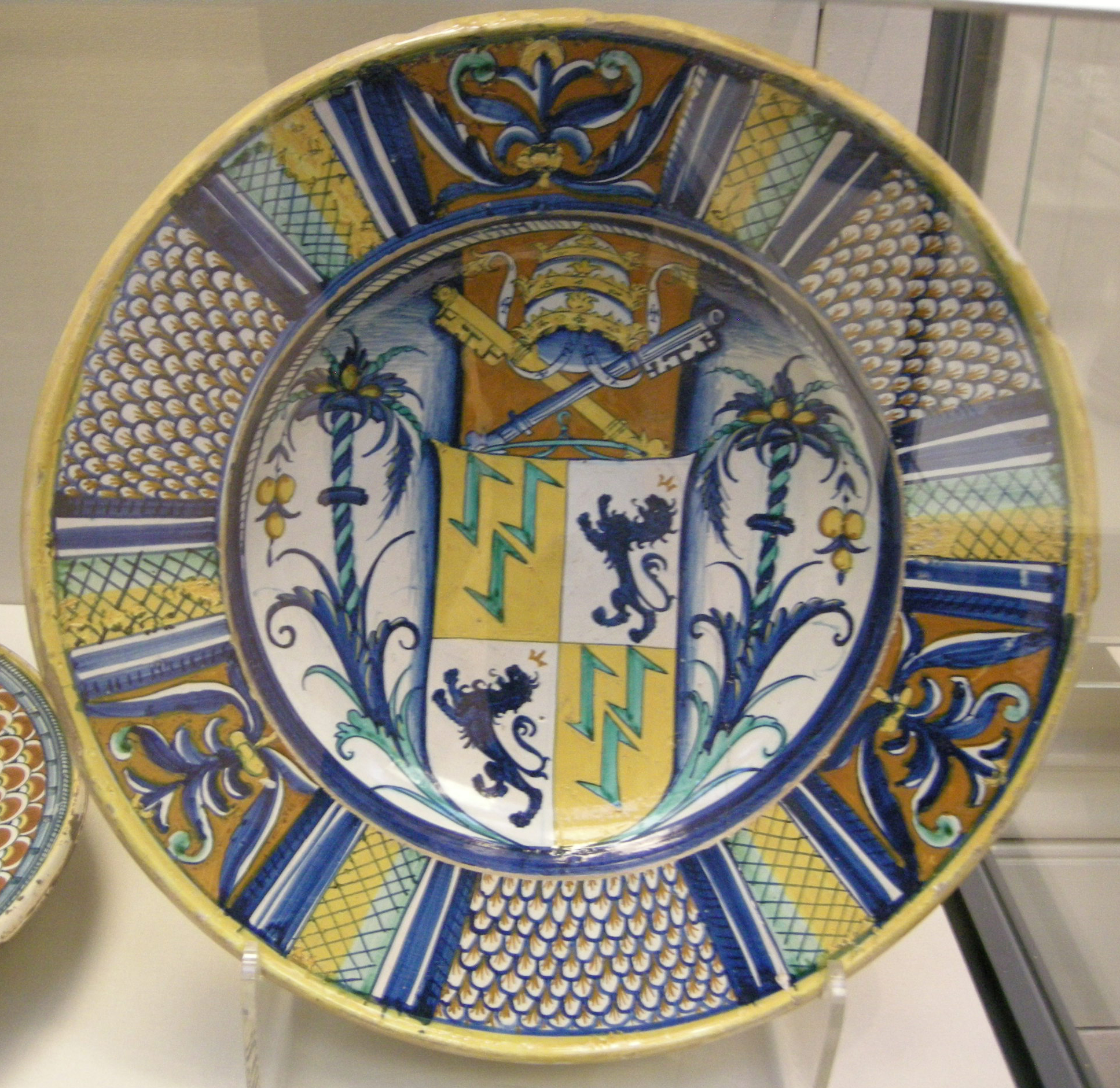 Deruta, piatto con stemma papa adriano VI, 1522-23